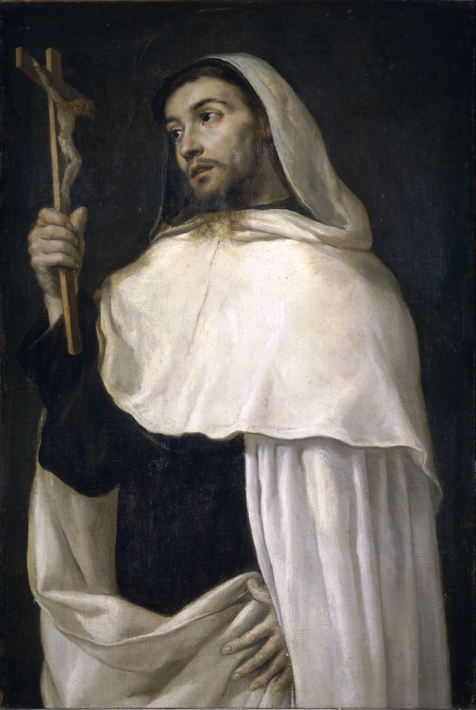 La obra representa a San Alberto de Sicilia, también conocido como Alberto de los Abate.